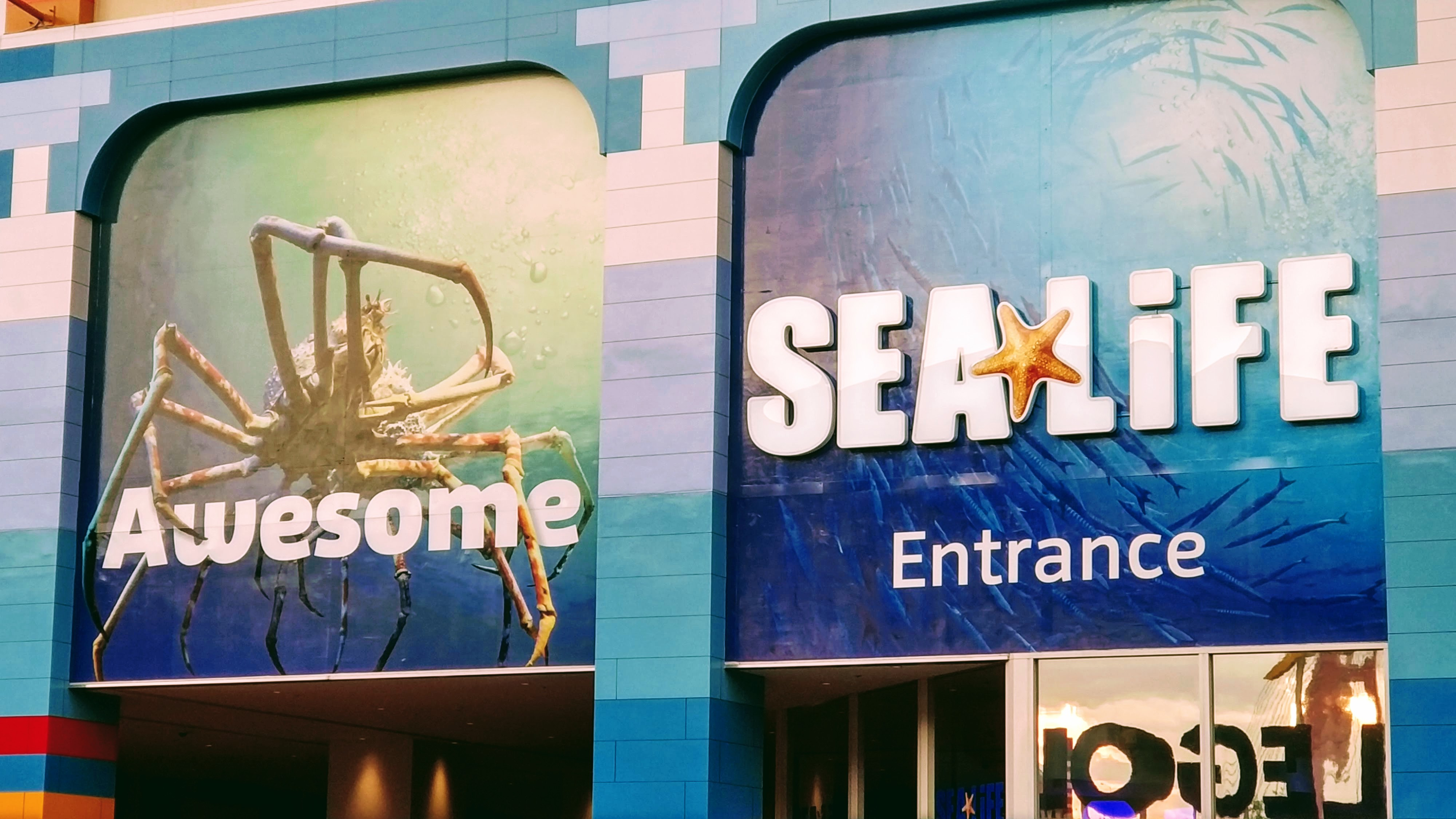 日本で初めてのシーライフ名古屋